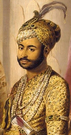 Umdat ul-Umara